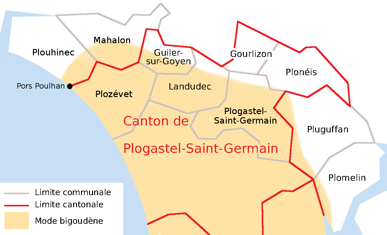 Je me suis inspiré de cartes trouvées dans René-Yves Creston, Le Costume breton, Champion, 1993, cartes 34, 36 et 41 (la carte 41 est relative à l'année 1939) ; et dans Jakez Cornou, Pierre-Roland Giot, Origine et Histoire des Bigoudens, Le Guilvinec, Le Signor, 1977, p. 34 (« vers 1950 »). On retrouve à peu près le même tracé (mais en plus petit) dans Pierre-Jakez Hélias, Coiffes et costumes de Bretagne, Châteaulin, Le Doaré, 1996, p. 15 ; et dans Mikael Bodlore-Penlaez, Divi Kervella, Atlas de Bretagne, Coop Breizh, 2011, p. 68. Tous ces tracés concernent le costume, et peut-être pas le parler, la musique, les danses, etc. Je n’ai pas cherché à les reproduire fidèlement, puisqu’il s’agit de cultures qui s’interpénètrent, de frontières assez floues, évolutives… Il ne faut donc voir ici qu’un croquis grossier, ne cherchant qu’à montrer que la frontière culturelle n’épouse pas les limites administratives.